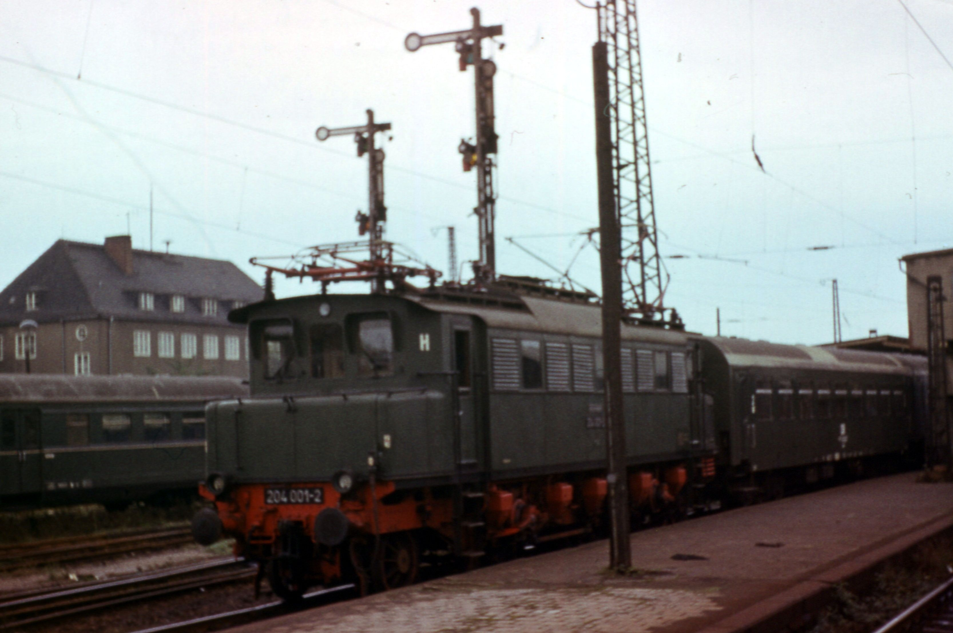 Eisenbahnsonderfahrt Dresden-Dessau 1979